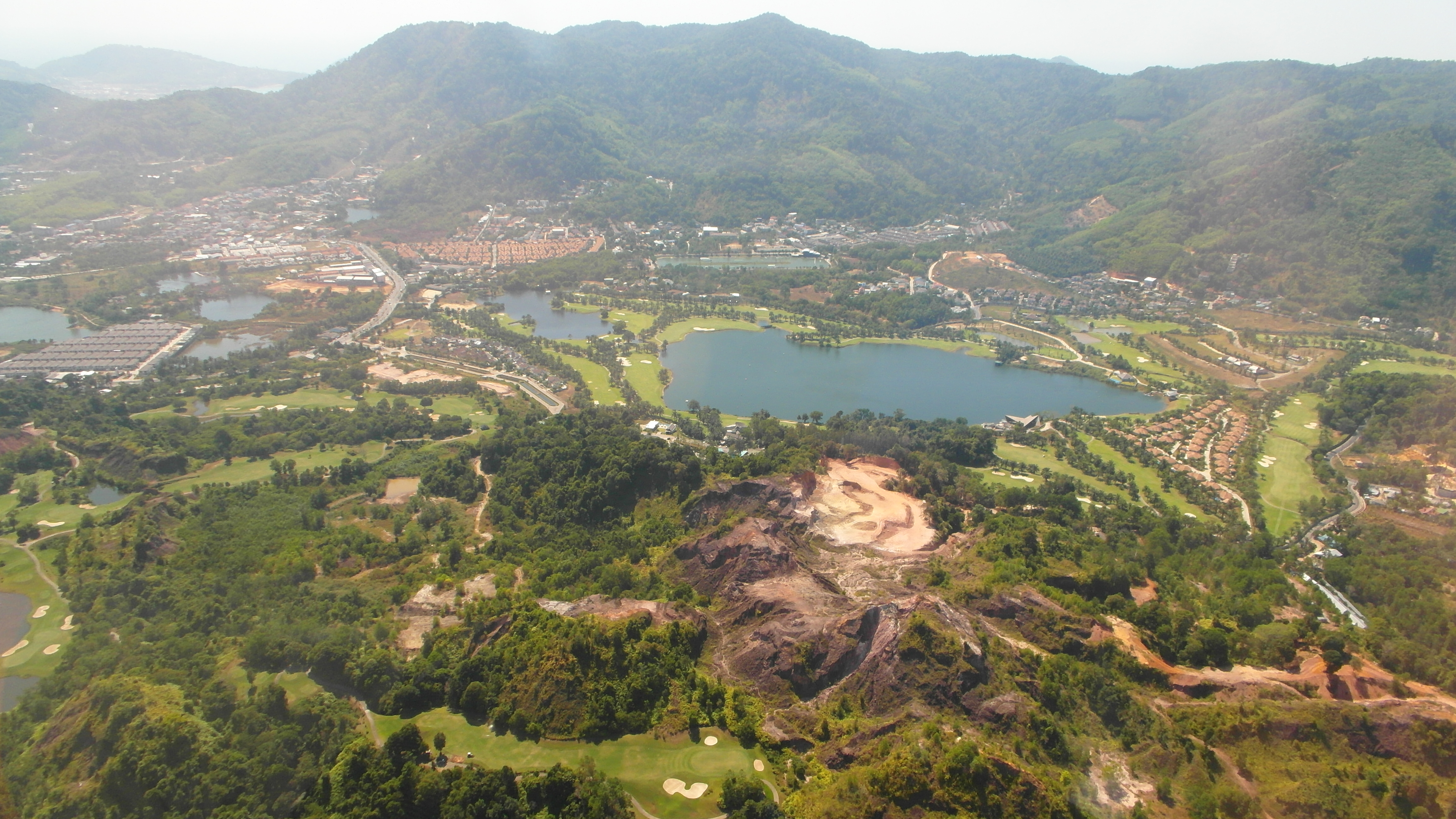 Phuket 2014 february